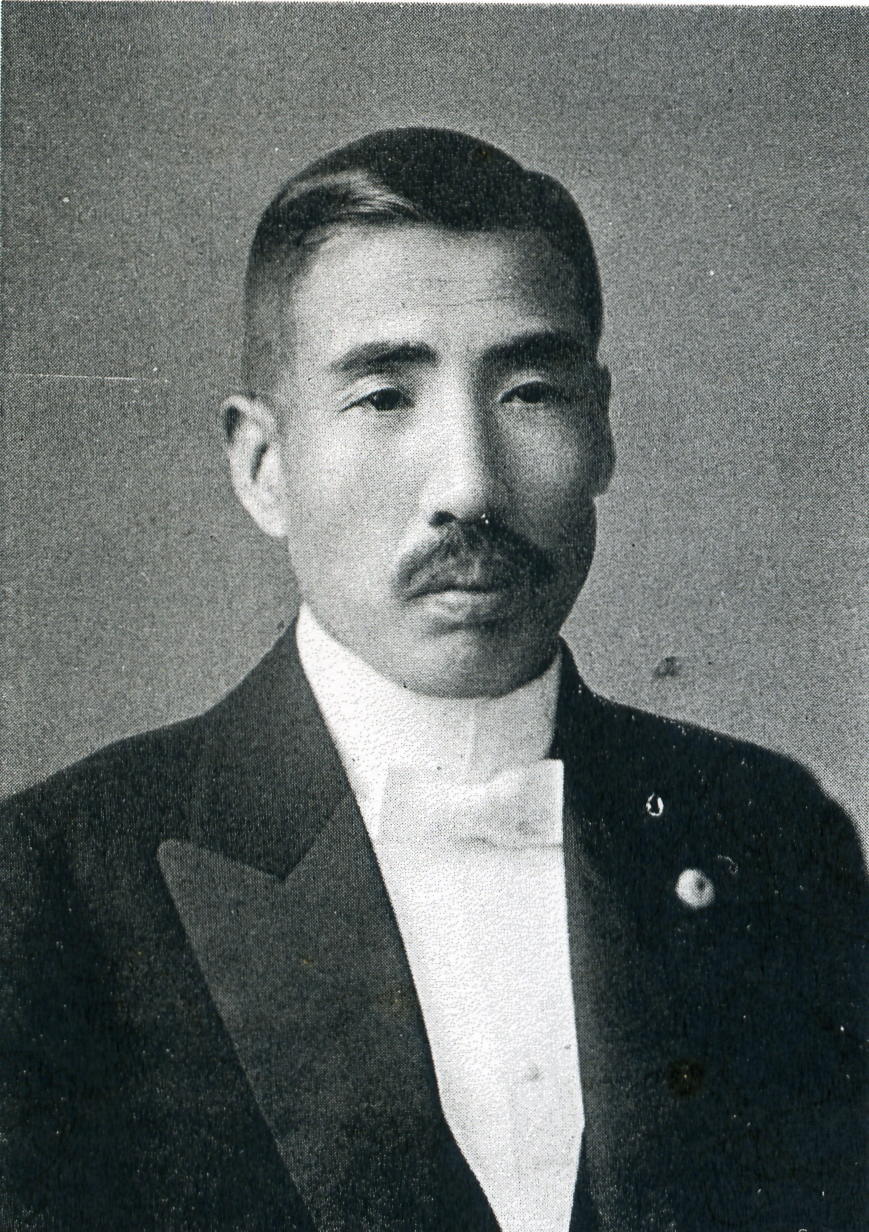 この写真は、門田新松（1876-1959）の写真です。